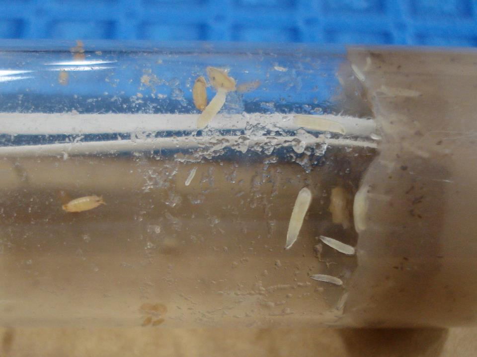 Larvas de Drosophila melanogaster